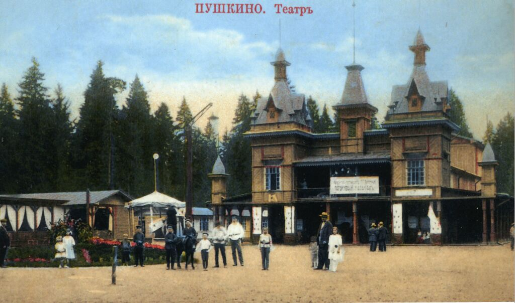 Летний театр в городском парке города Пушкино. Построен в 1896 году.